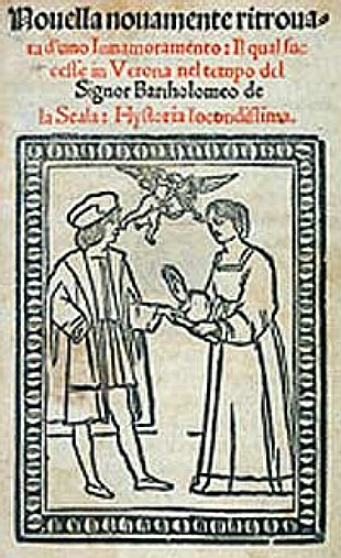 Die Titelseite der Originalfassung von "Romeo und Giulietta"